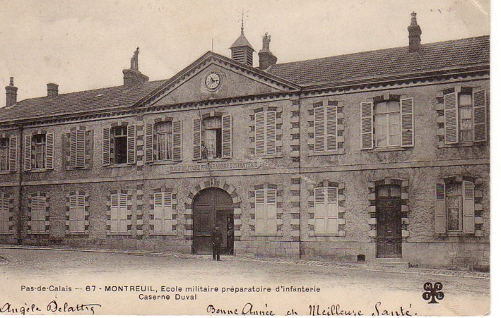 Ecole Militaire Préparatoire, Caserne Duval, rue porte Becquerelle, Carte Postale